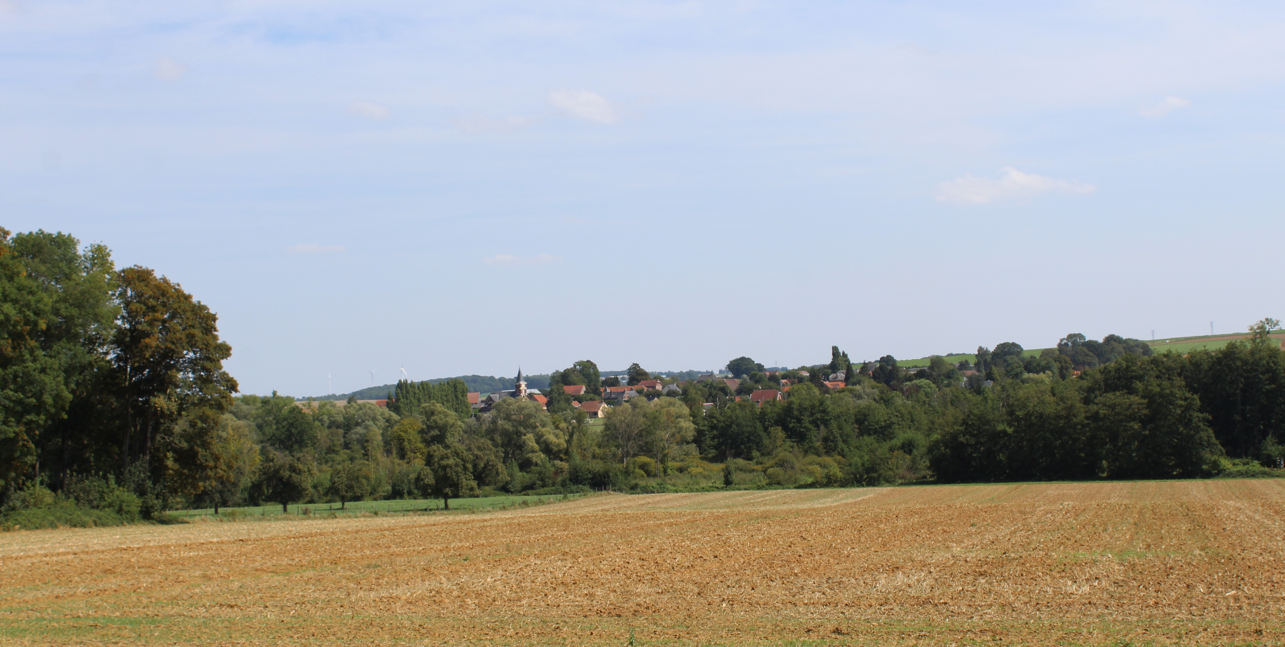 Panorama du village de Maissemy